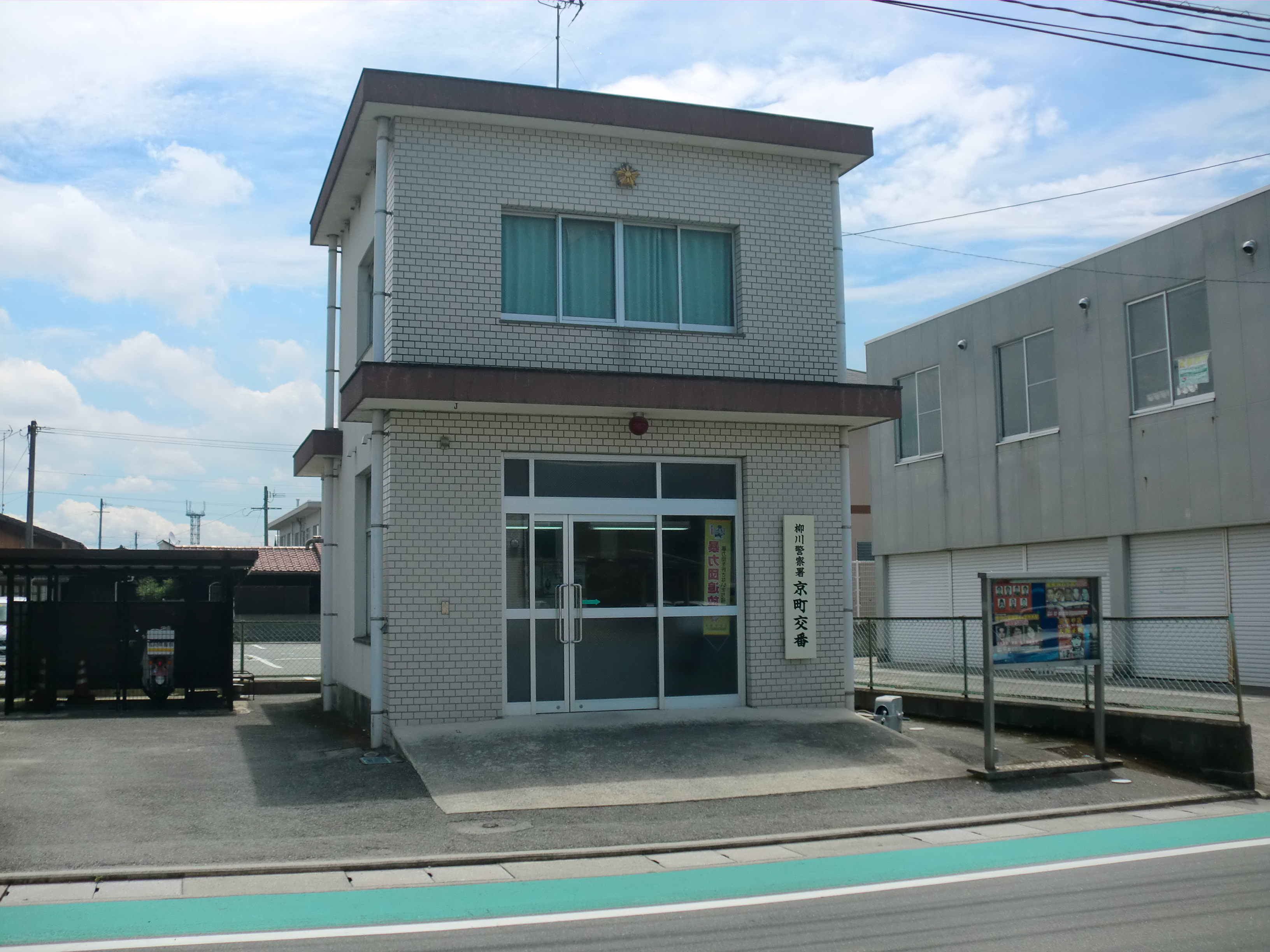 福岡県柳川市にある柳川警察署京町（きょうまち）交番